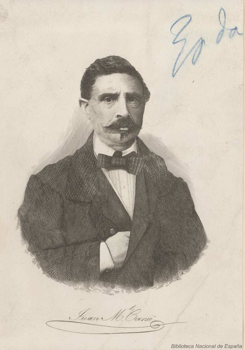 Juan Manuel Carsi. Grabado anónimo. Biblioteca Nacional de España. Dirigente de la junta revolucionaria formada en Barcelona en noviembre de 1842